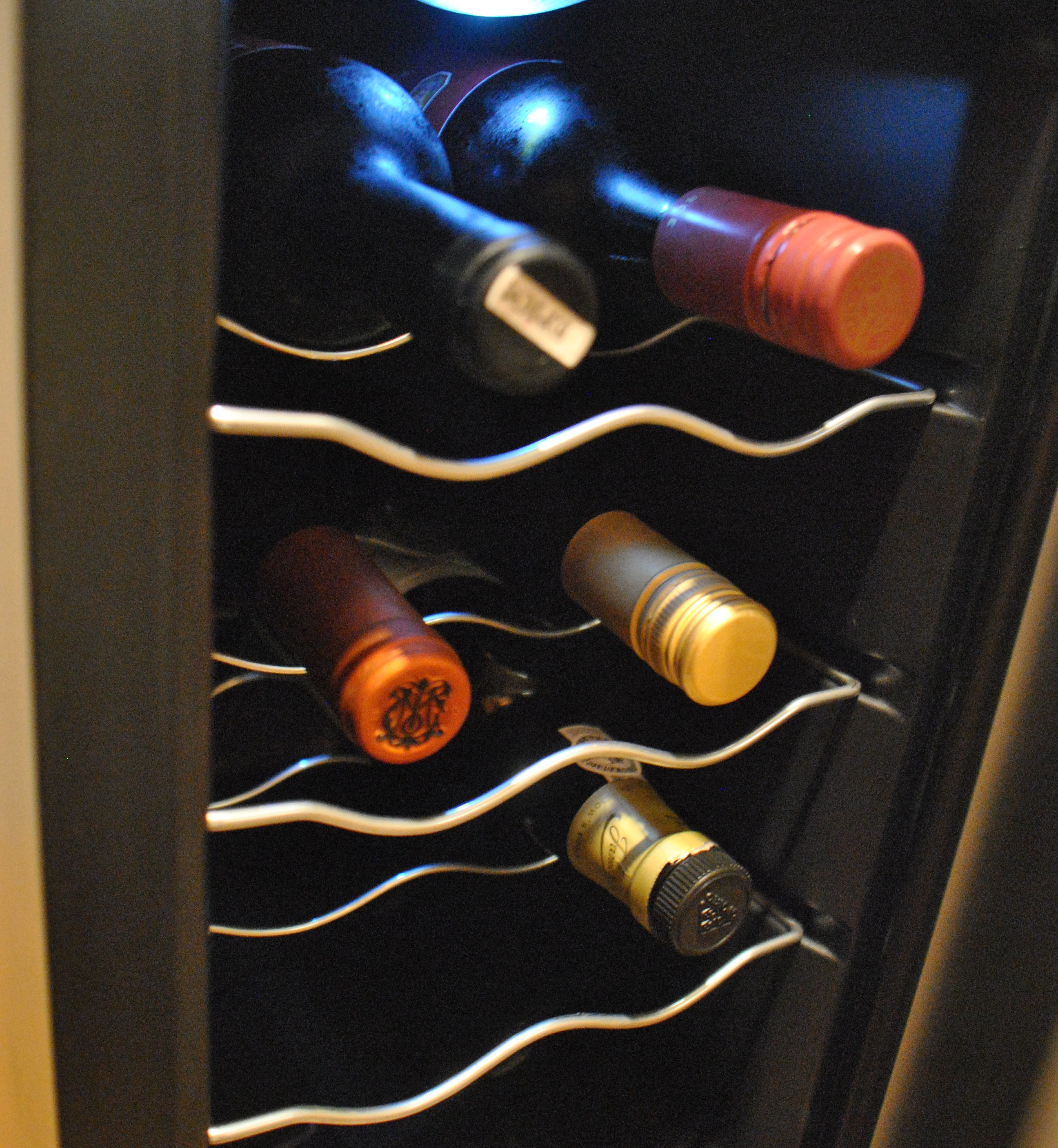 와인셀러